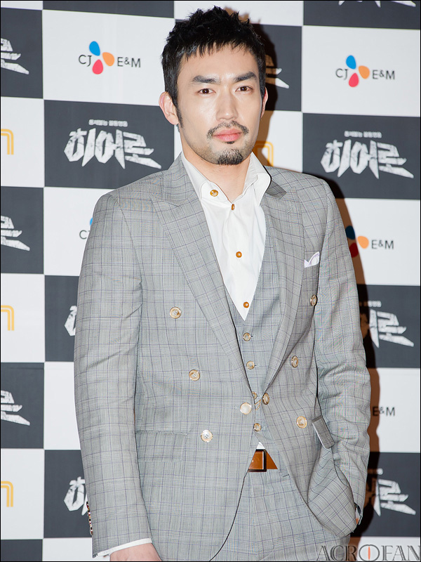 OCN 드라마 히어로 제작 발표회에 참석한 오타니 료헤이